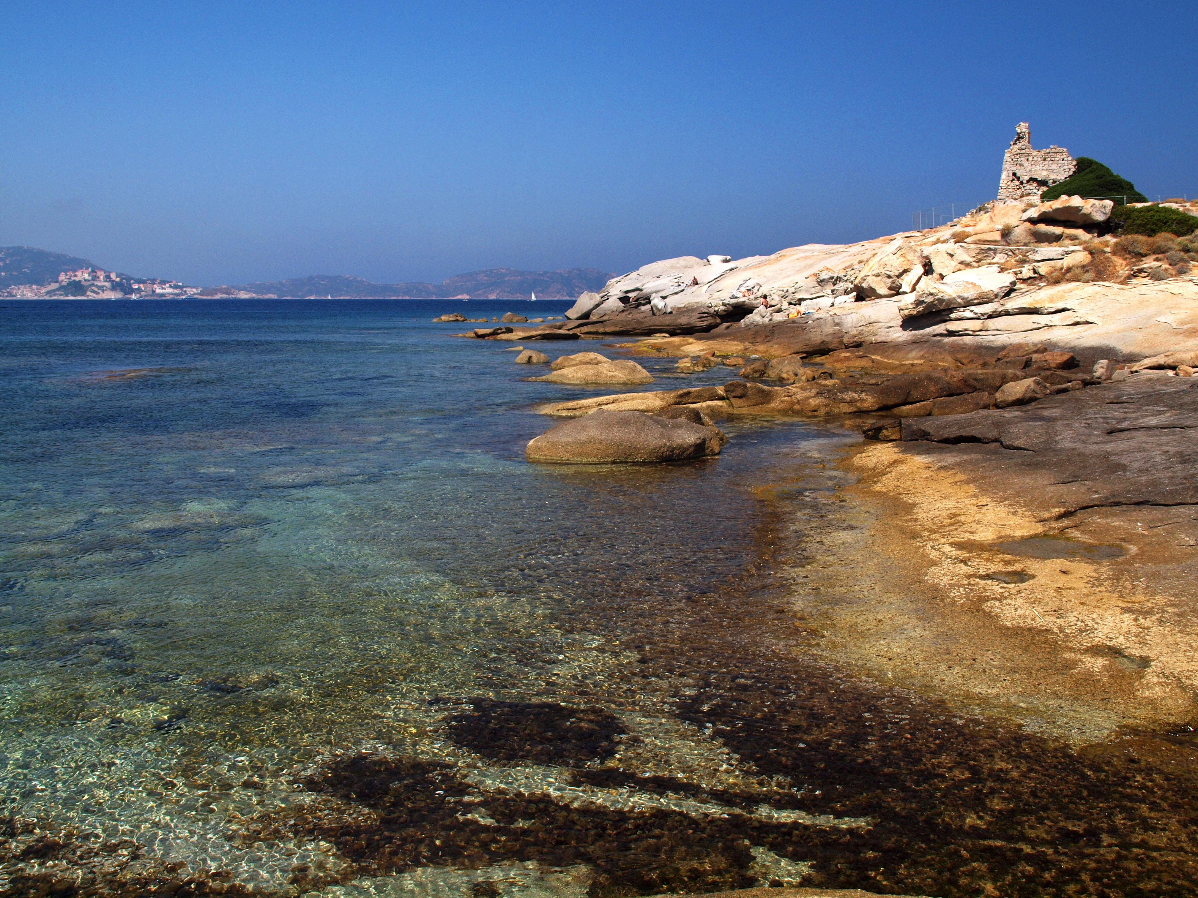 Lumio (Corse) - Tour génoise de Caldanu (XVIe s.), ruinée par les bombardements de la marine anglaise en 1794. Au fond, la citadelle de Calvi